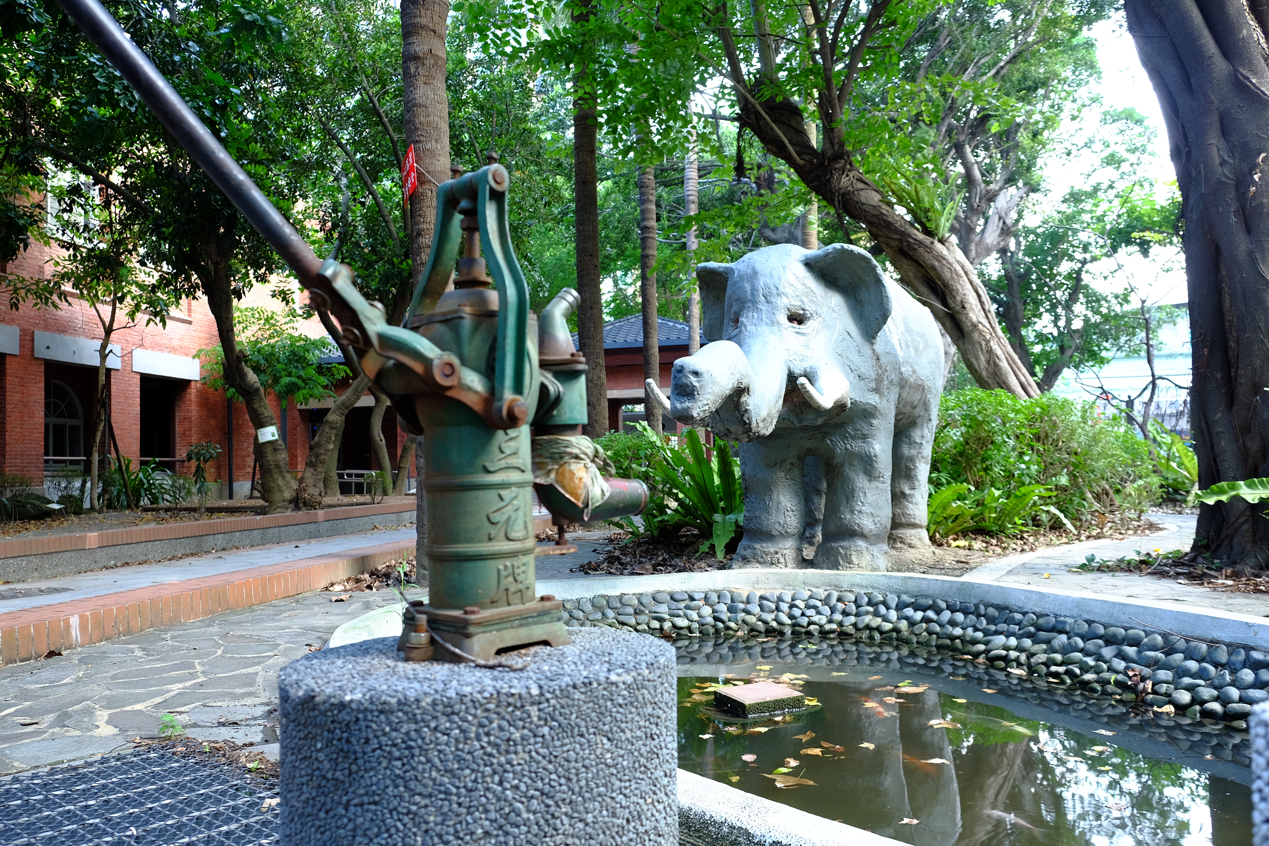 中文（台灣）: 臺北市大同區日新國民小學大象噴水池。